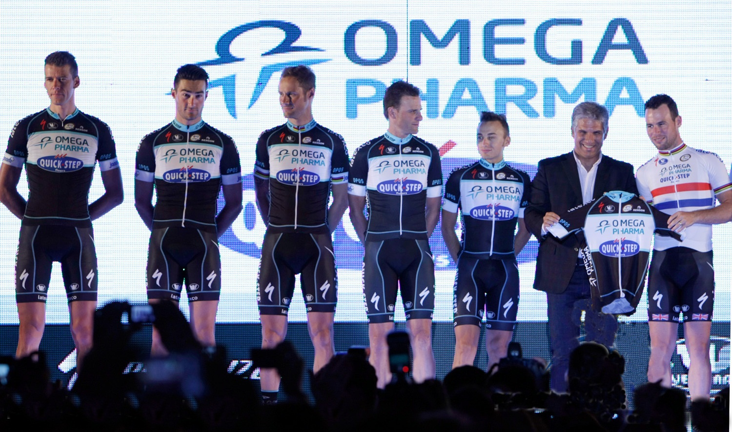 El Omega Pharma Quick Step en la Presentación del Tour de San Luis 2014